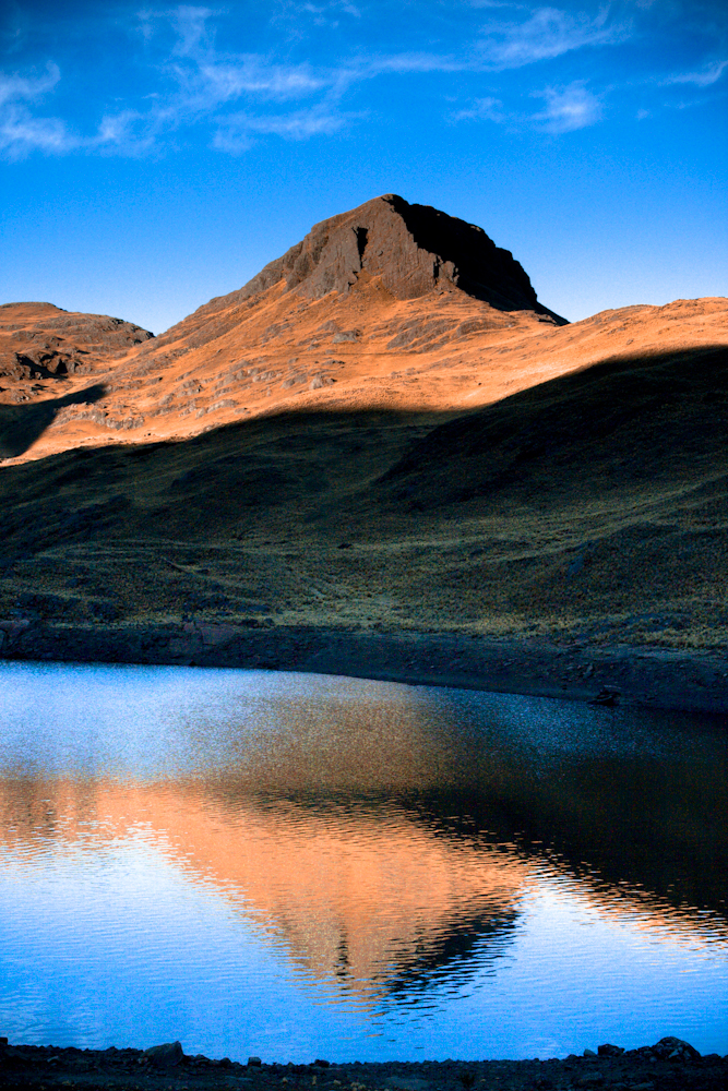 laguna en el Parque Nacional Tunari, ubicado en el departamento de Cochabamba, Bolivia